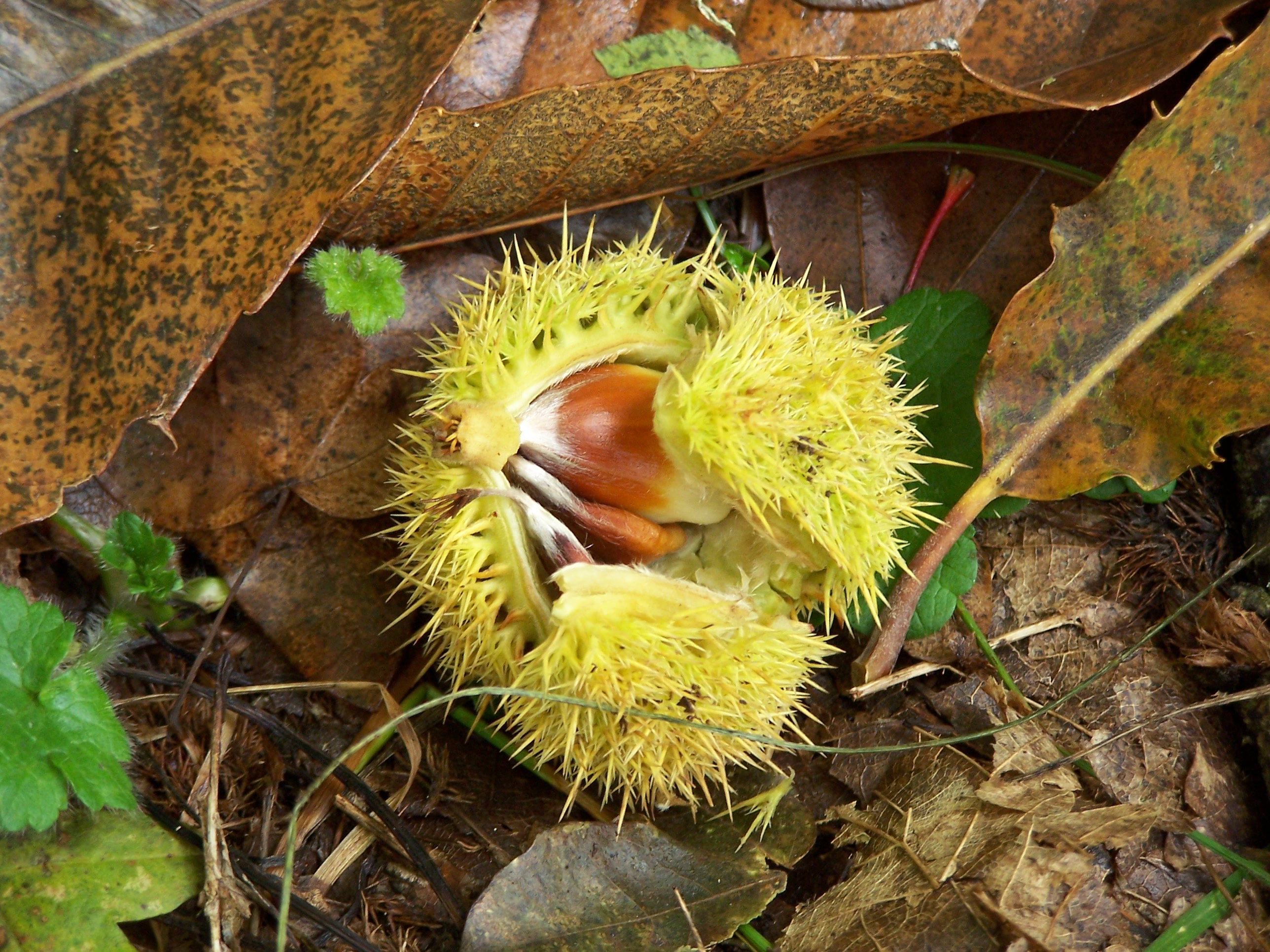 Castagne...